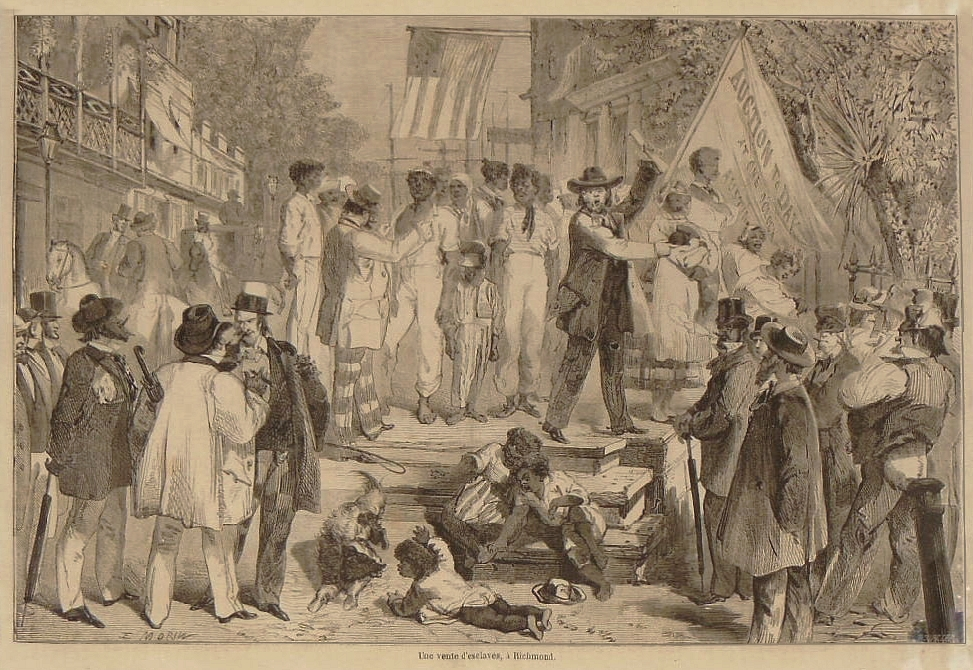 Une vente d'esclaves à Richmond, estampe d'Edmond Morin, vers 1865, 24 x 33 cm. Musée du Nouveau Monde (La Rochelle, Charentes-Maritimes), INV n° MNM.2015.0.29.